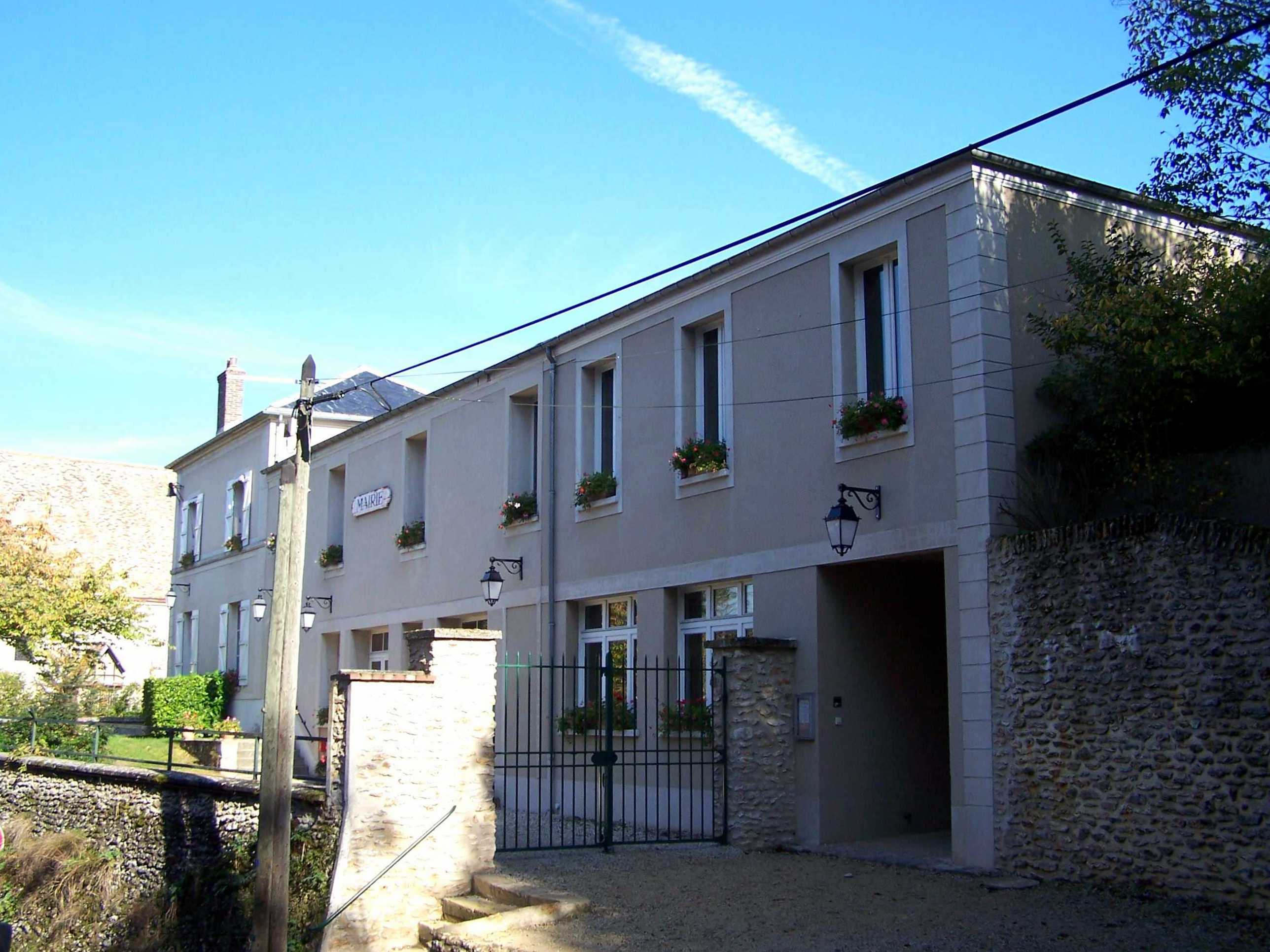 Mairie de Grosrouvre (Yvelines, France)